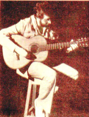 Antigua foto de maneco galeano